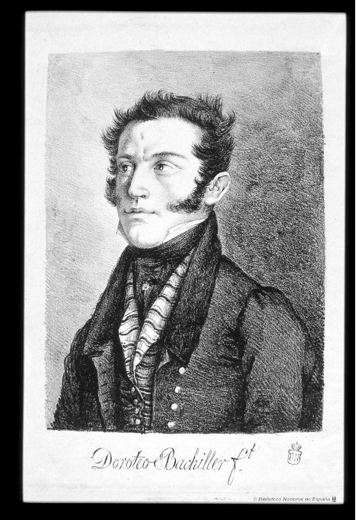 Retrato de Doroteo Bachiller.